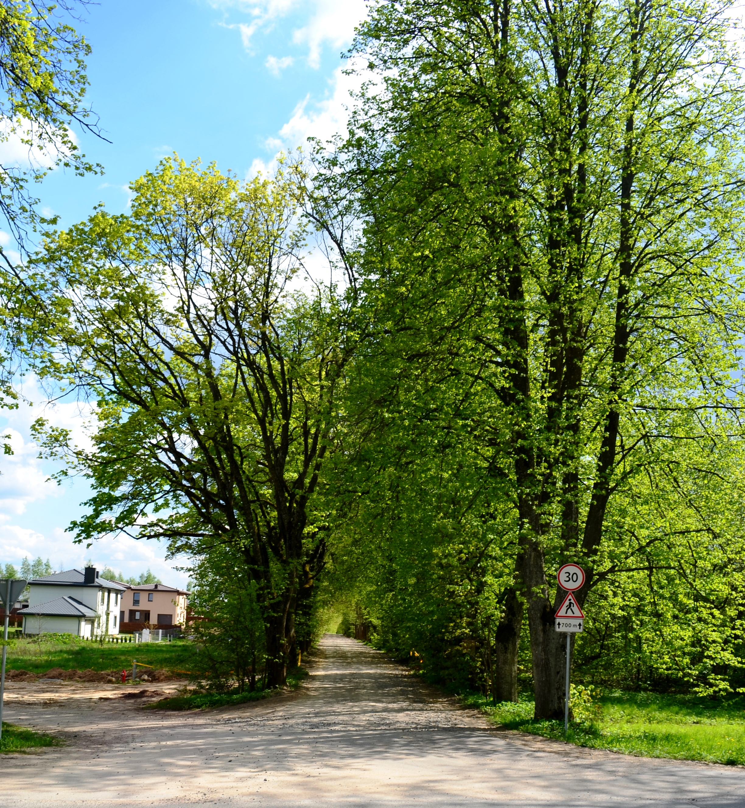 Alėja aplink S. Lozoraičio gatvę, Strielčiukai, Vilnius